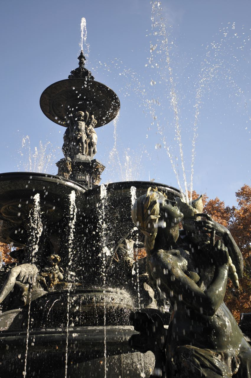 Fuente ubicada en el Parque Gral. San Martín de la ciudad de Mendoza.